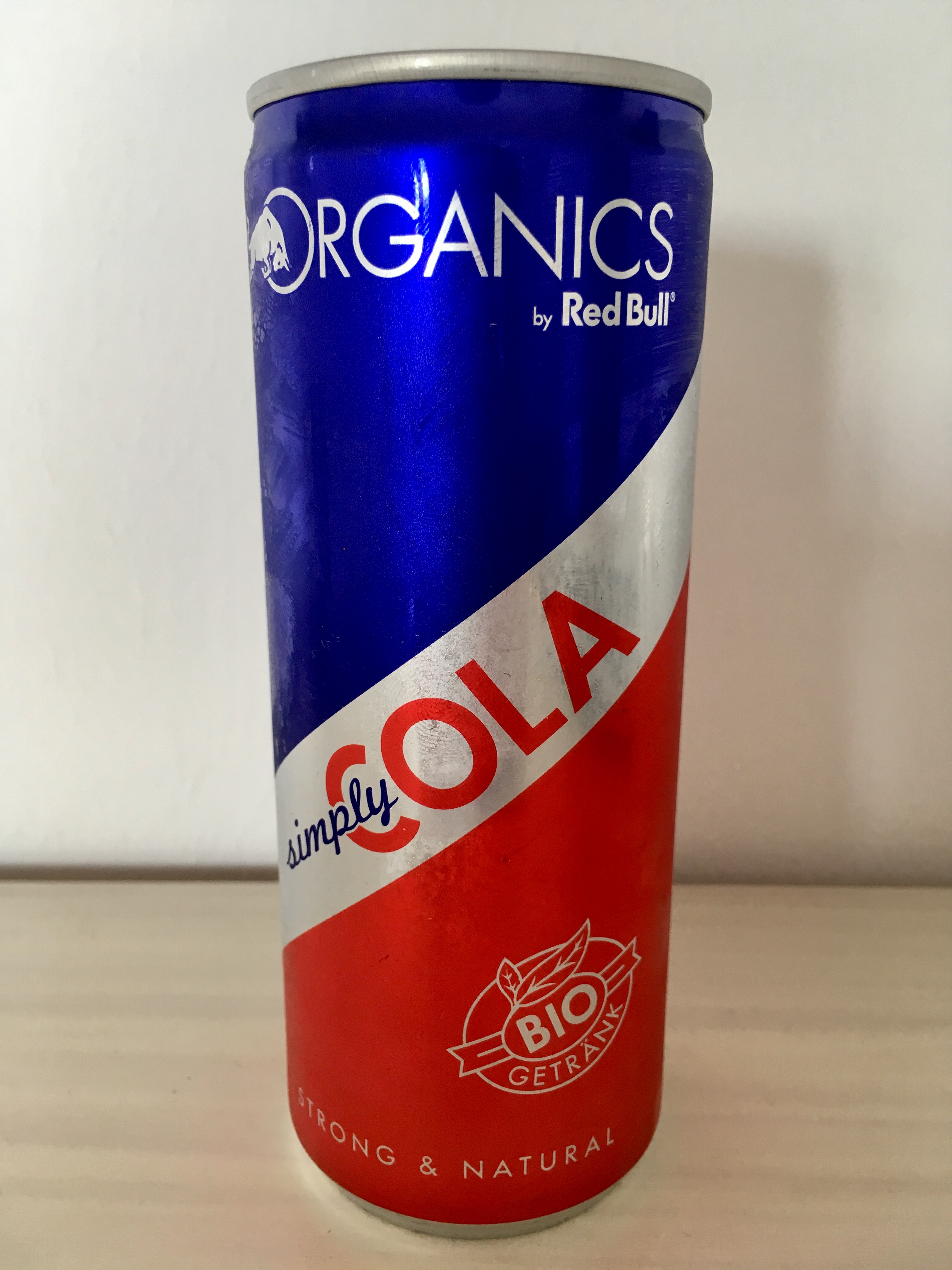 Red Bull Cola 250ml Dose